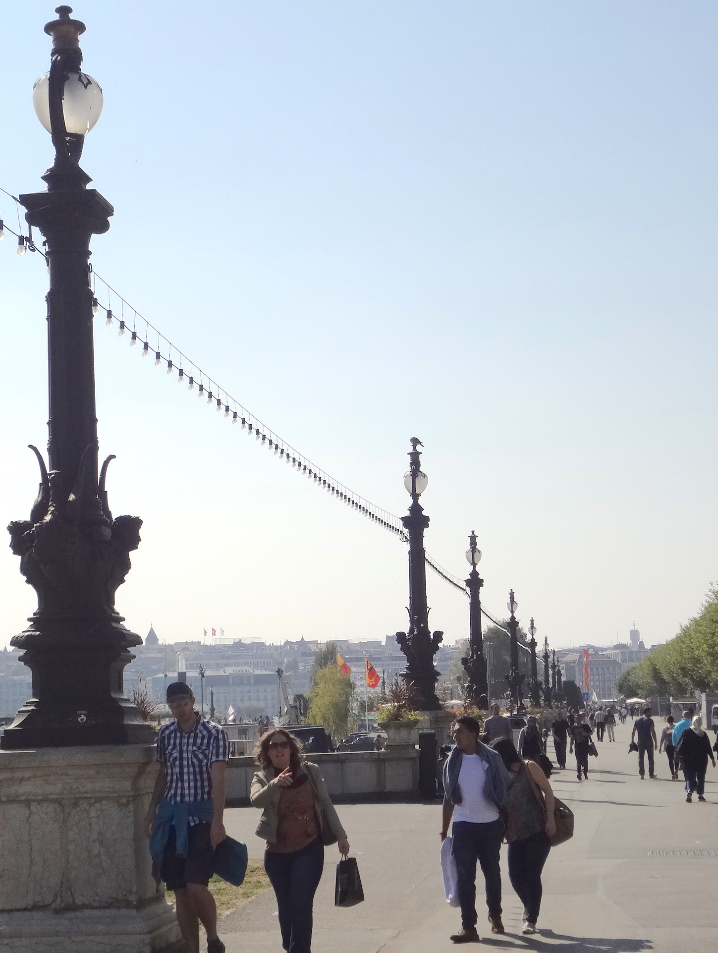 Aménagement du quai du Mont-Blanc à Genève, suite de candélabres.